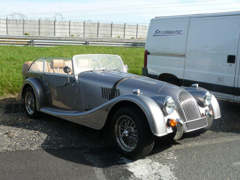 Montlhery 2012